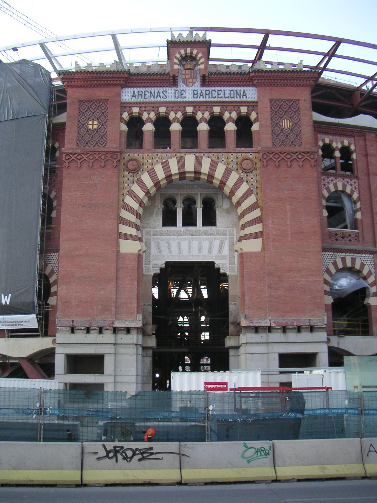 Antiga entrada de la plaça de toros modernista Las Arenas (Barcelona) en fase de reconversió en centre comercial.